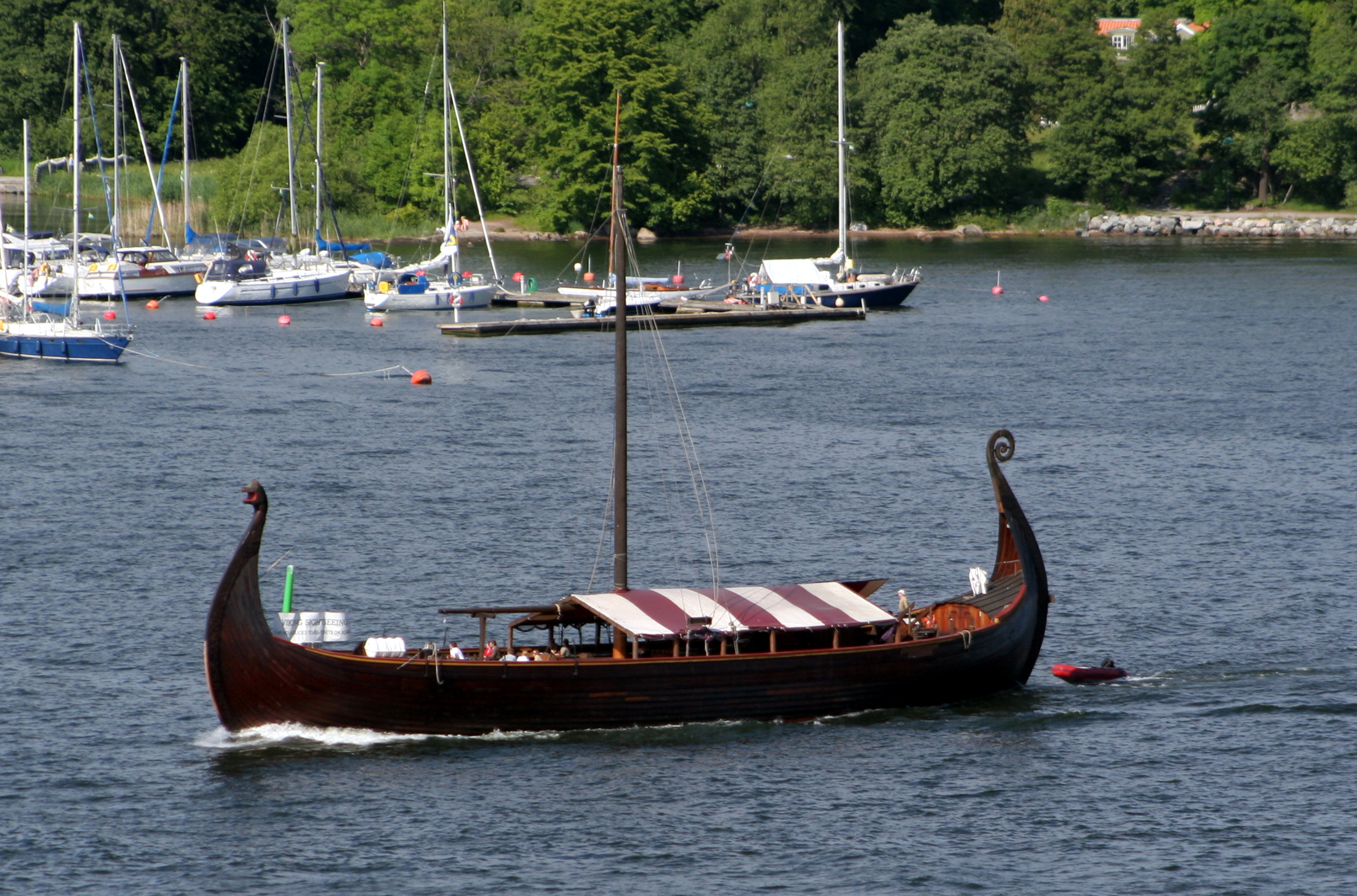 Fake Viking's ship in Stockholms ström.